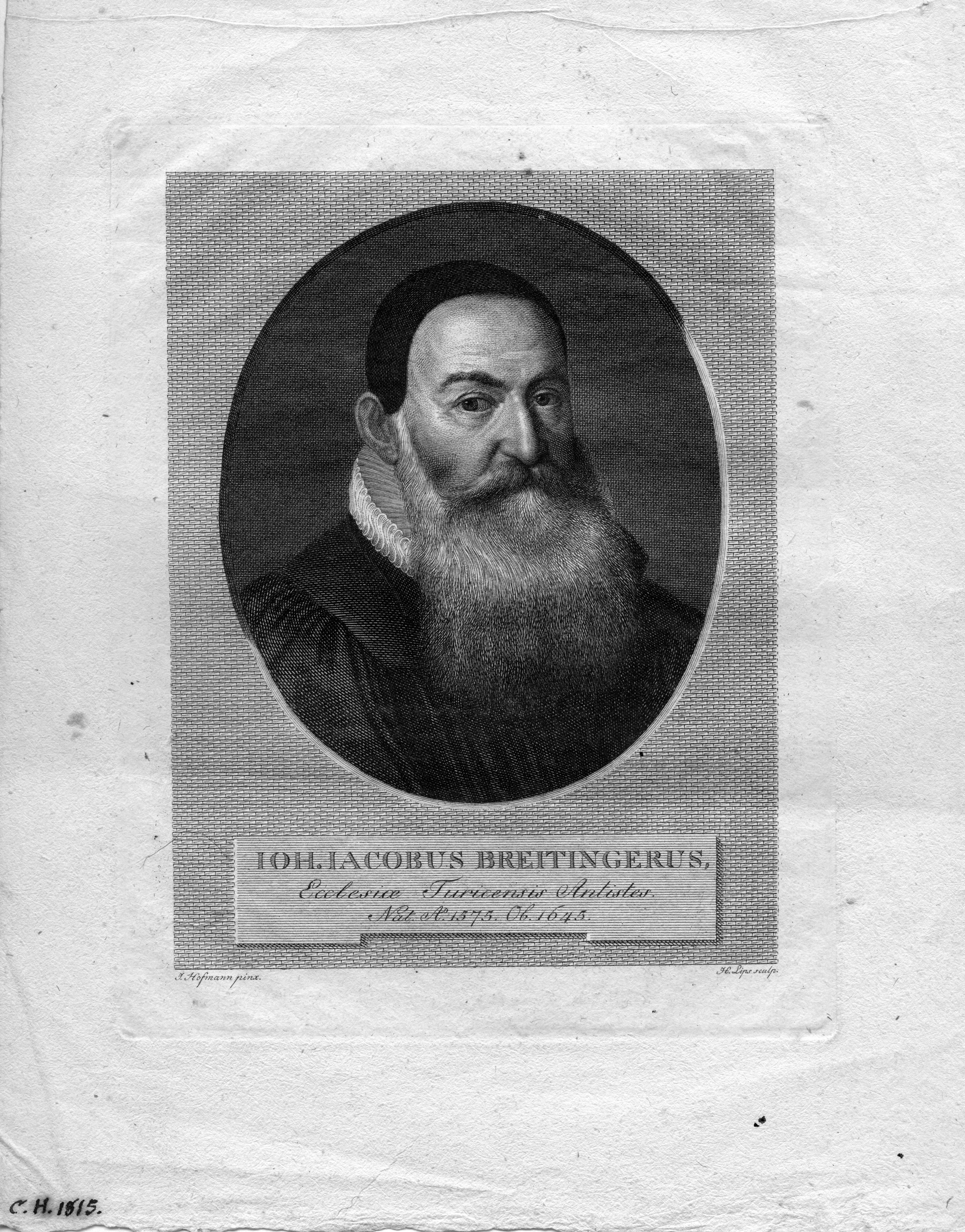 portrait gravé